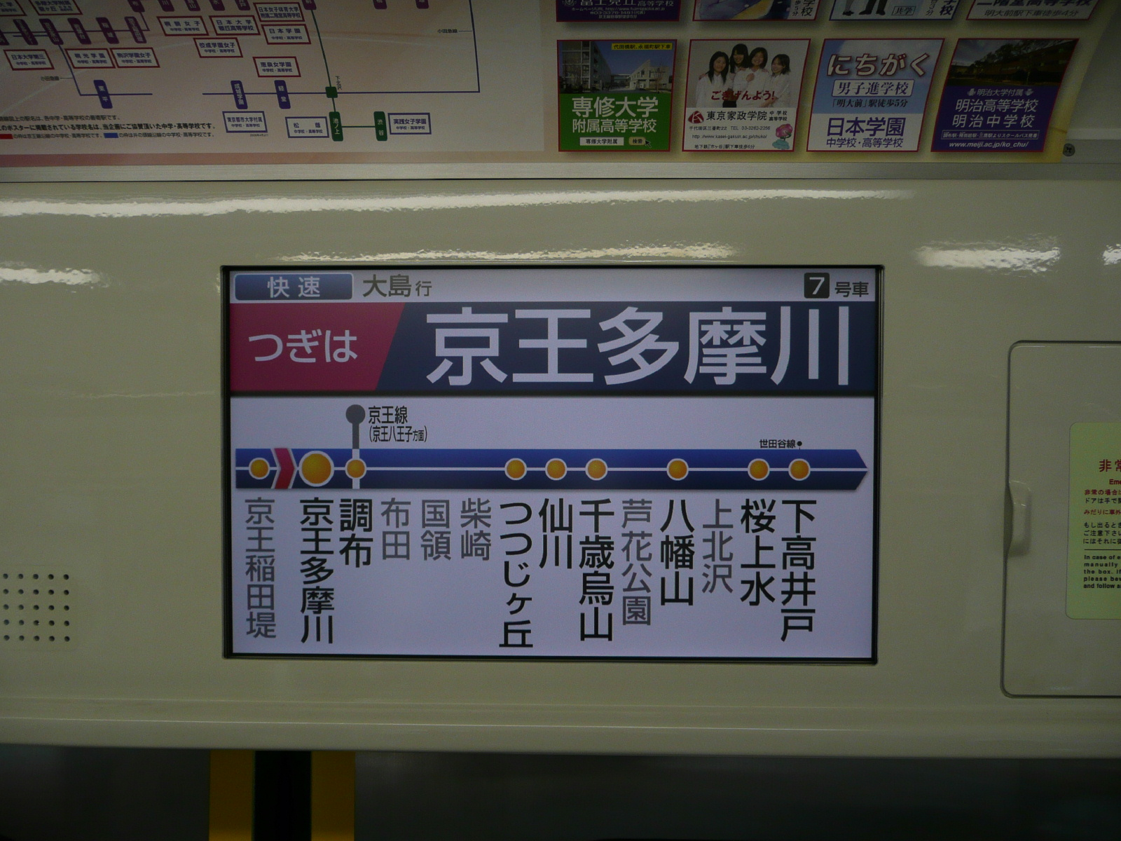 次駅が京王多摩川駅であることを示す、京王9000系30番台(LCD搭載車)の表示。